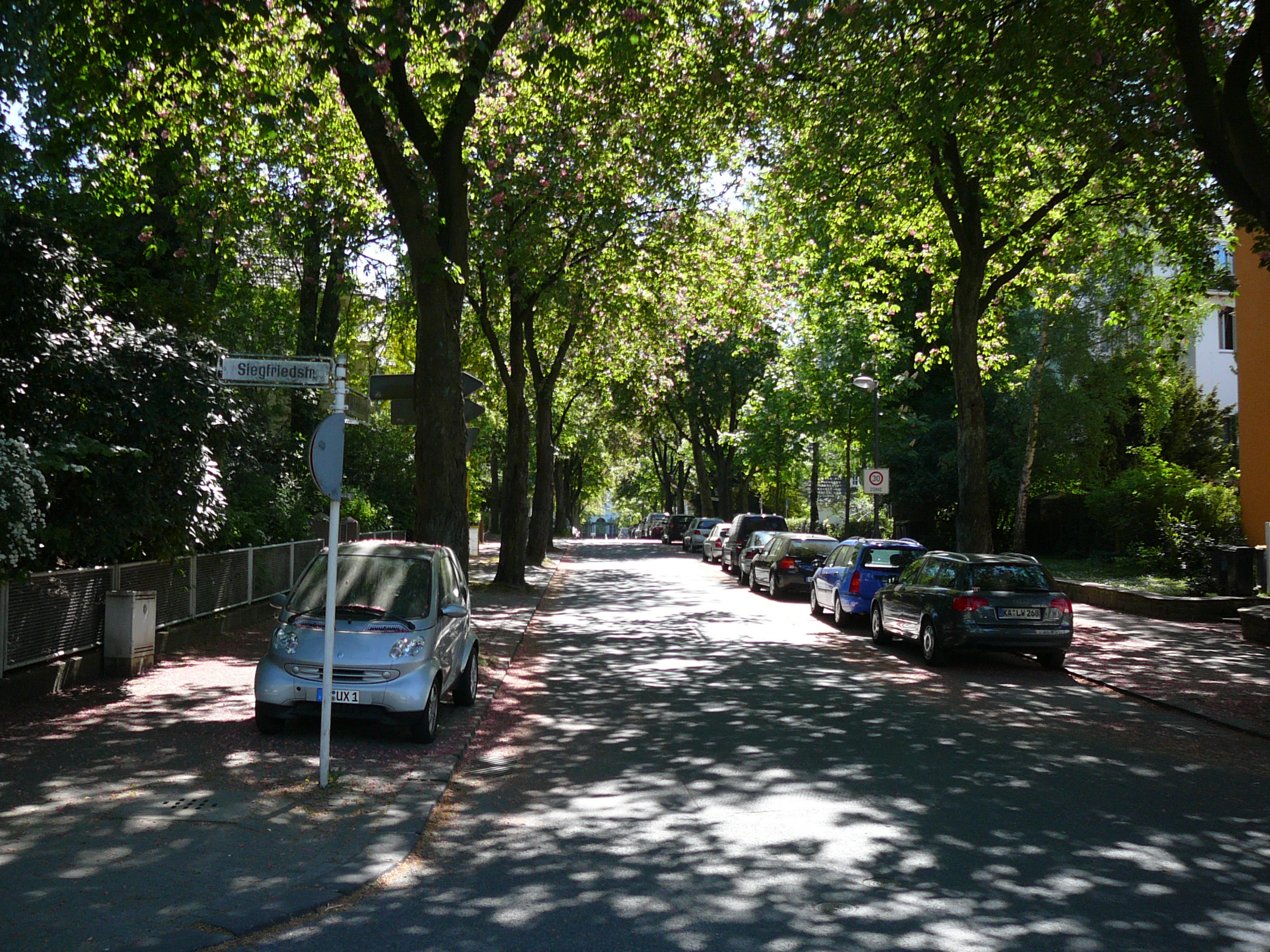 Wuppertaler Zooviertel, Wuppertal